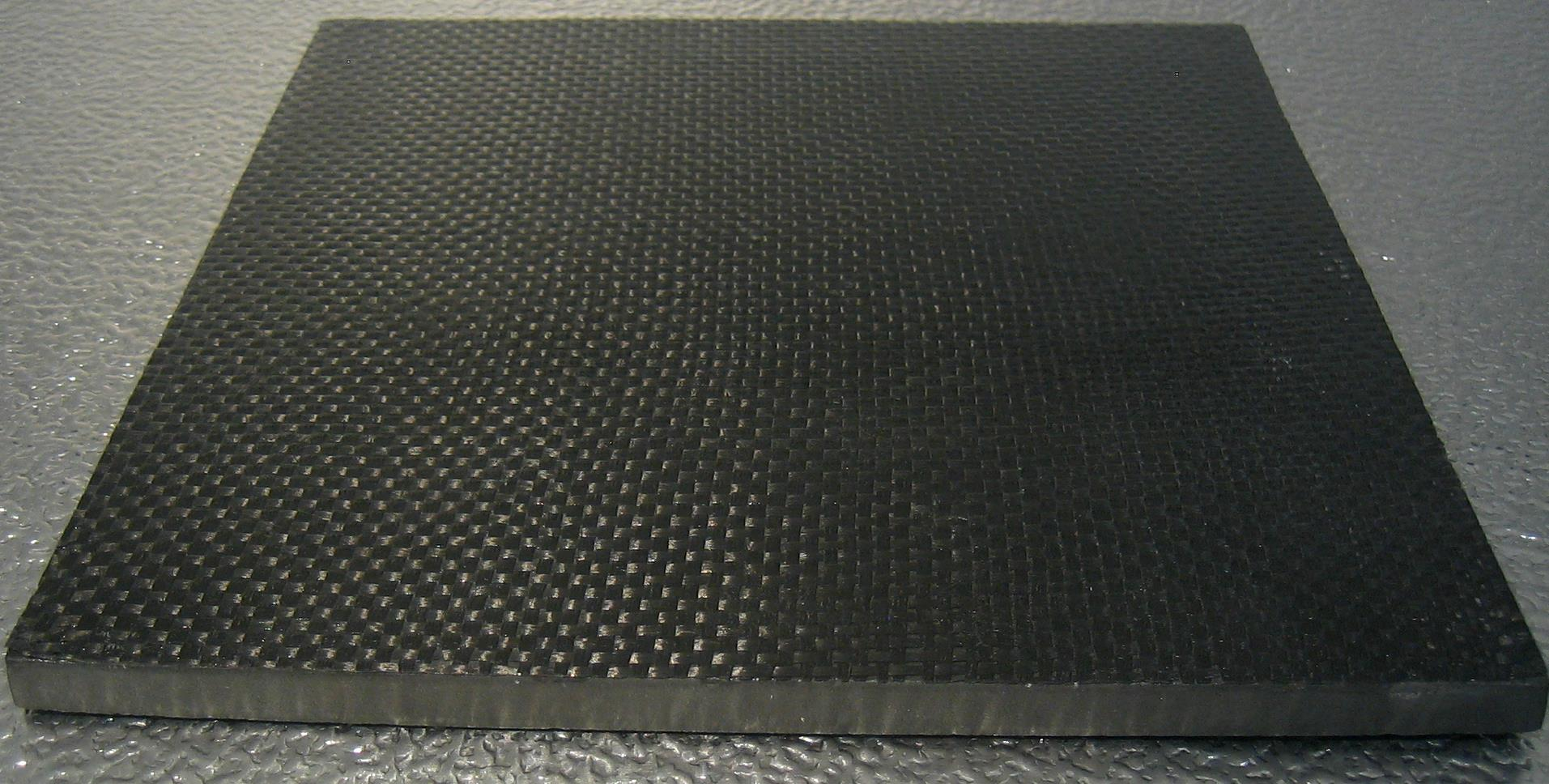 Beschusshemmender Verbundwerkstoff aus Kevlar im Militärhistorischen Museum der Bundeswehr